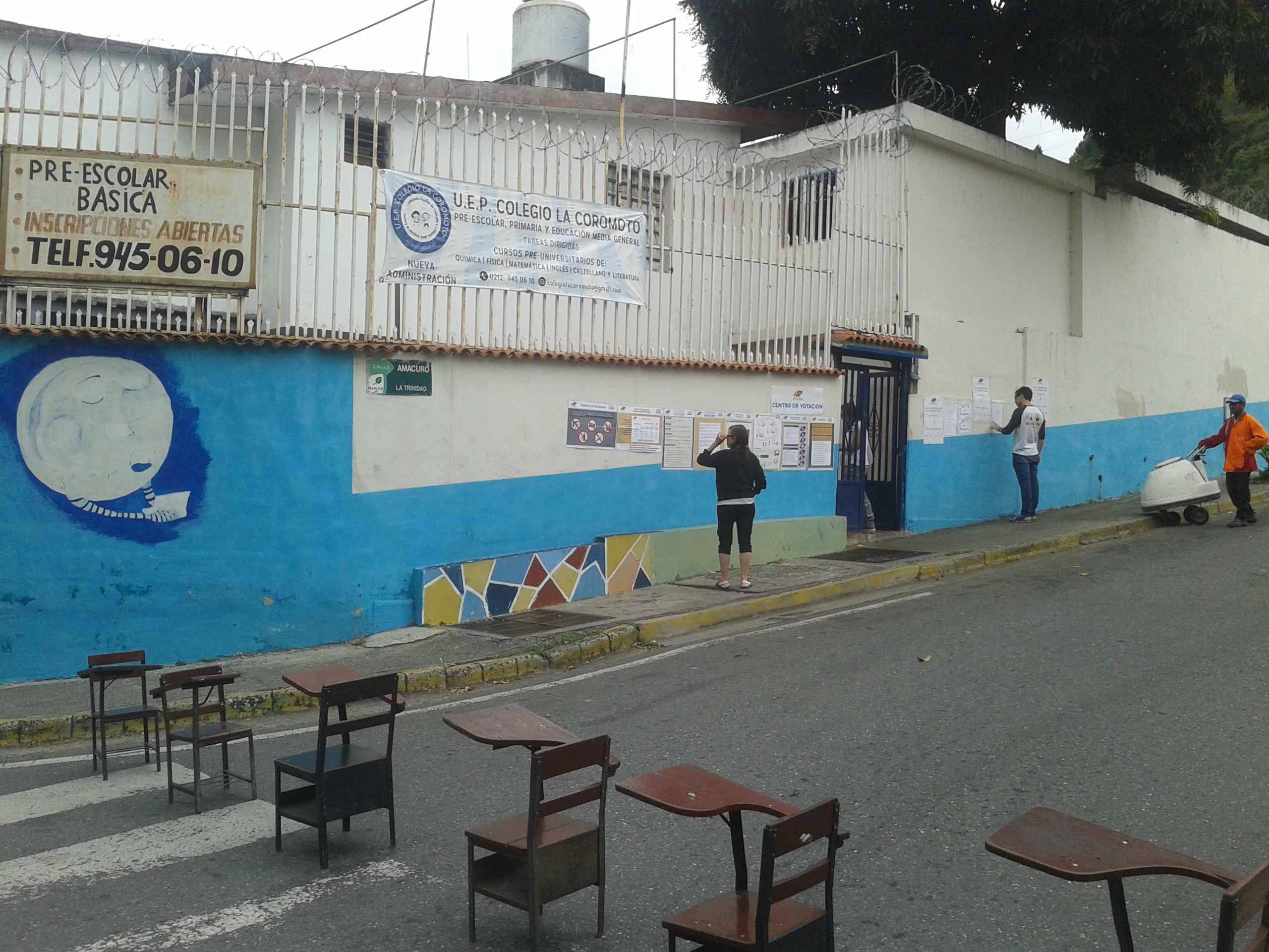 Centro electoral en Caracas durante las elecciones municipales de Venezuela de 2017.